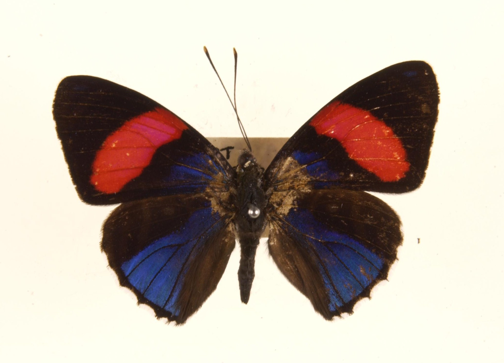 Catagramma hesperis Guérin-Méneville, [1844